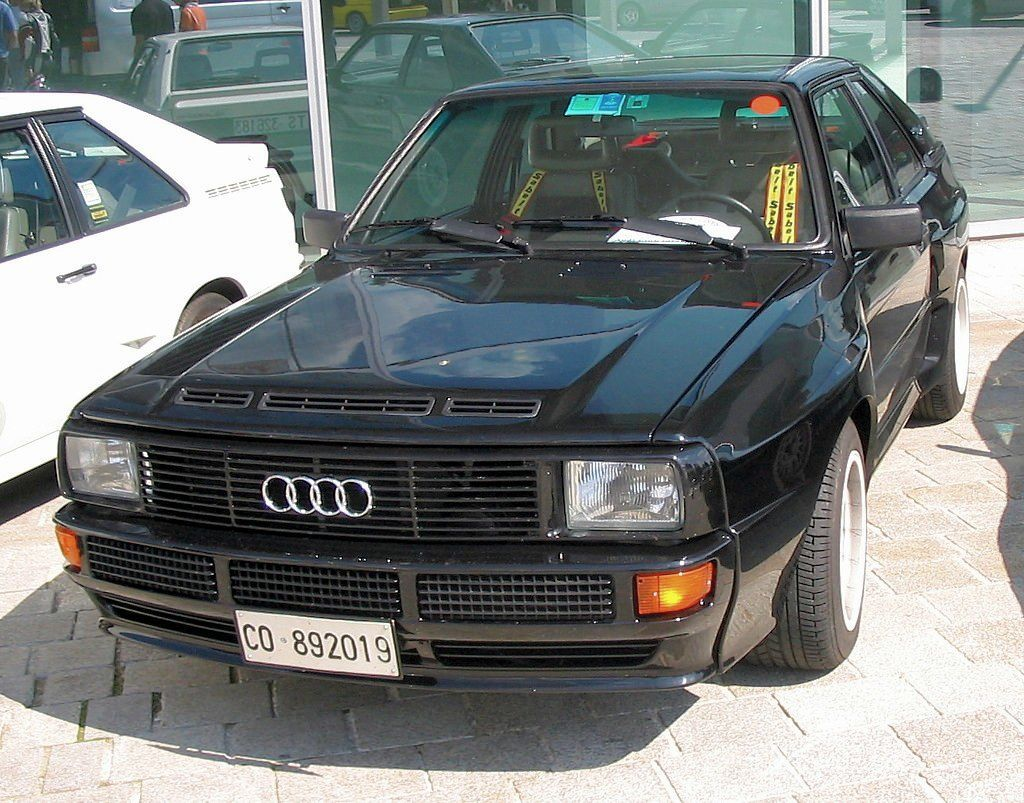 Audi Sport quattro im August 2005 bei den Feierlichkeiten zum 25-jährigen Jubiläum des Audi quattro auf dem Gelände des Audi Forum in Ingolstadt.